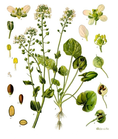 Echte Löffelkraut. A junge, aus den Basalblättern bestehende Pflanze, natürl. Grösse; B blühender Stengel, desgl.; 1 Blüthenknospe, vergrössert; 2 Blüthe, desgl.; 3 dieselbe zerschnitten, desgl.; 4 Kronblatt, desgl.; 5 innere Blüthe, desgl.; 6 Staubgefässe, desgl.; 7 Pollen, desgl.; 8 Frucht, desgl.; 9 dieselbe geöffnet, desgl.; 10 dieselbe ohne Klappen, desgl.; 11, 12 Same von verschiedenen Seiten, desgl.; 13, 14 derselbe zerschnitten, desgl.